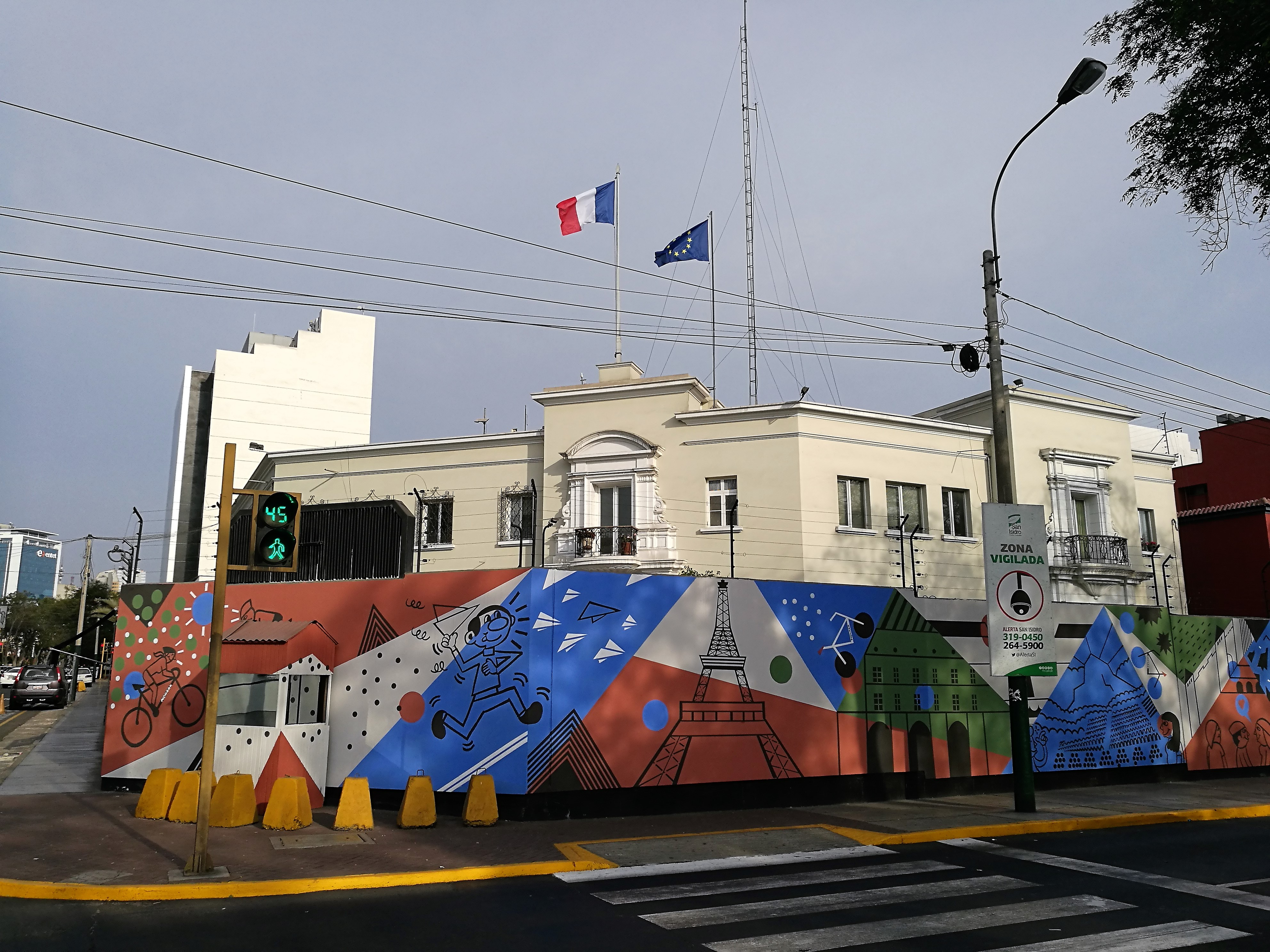 Ambaixada de França al Perú la confluència entre la Avenida Arequipa i el carrer de la Habana, a San Isidro, Lima